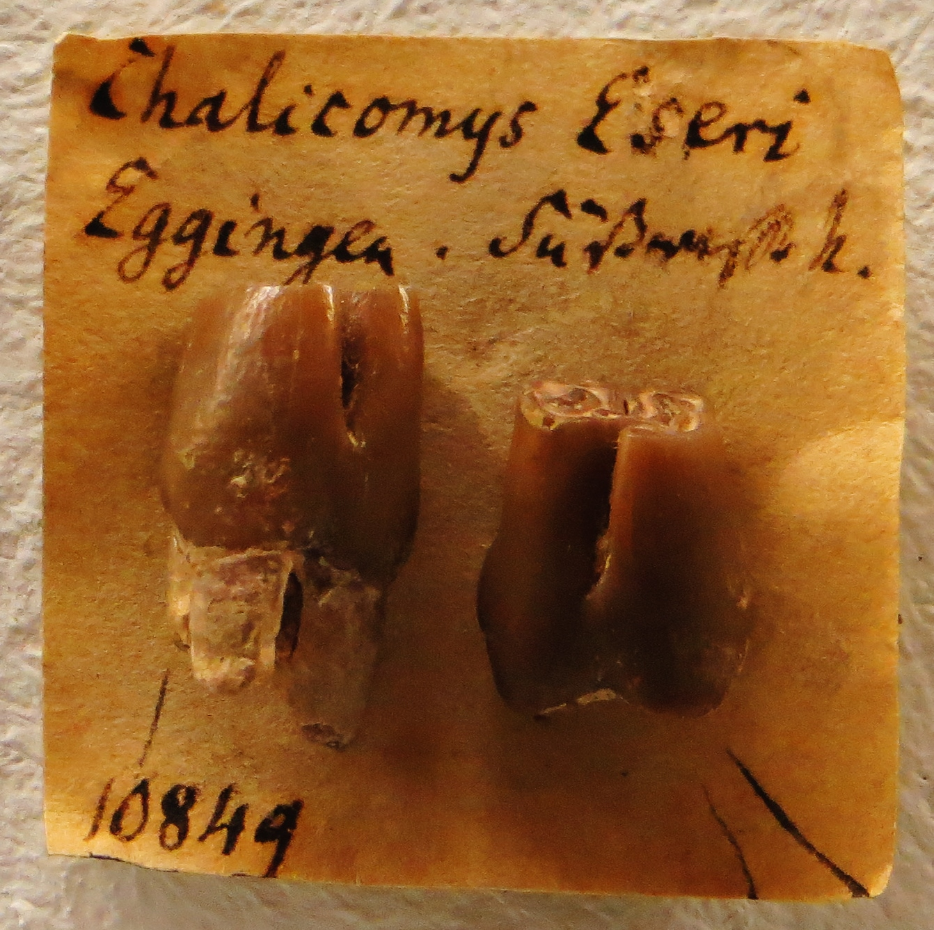 Fossil of Steneofiber, an extinct mammal - Took the picture at Museum of Paleontology, Tuebingen